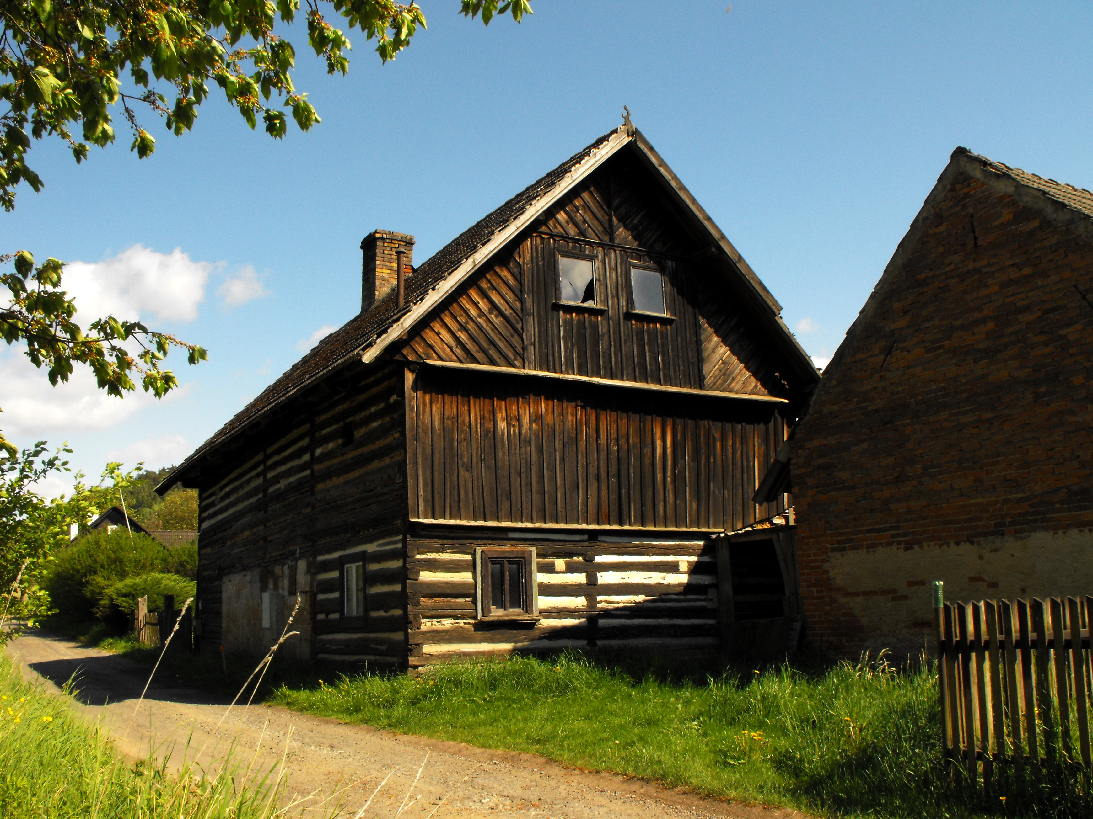 Tradicia domo en Křenov, Ĉeĥio.